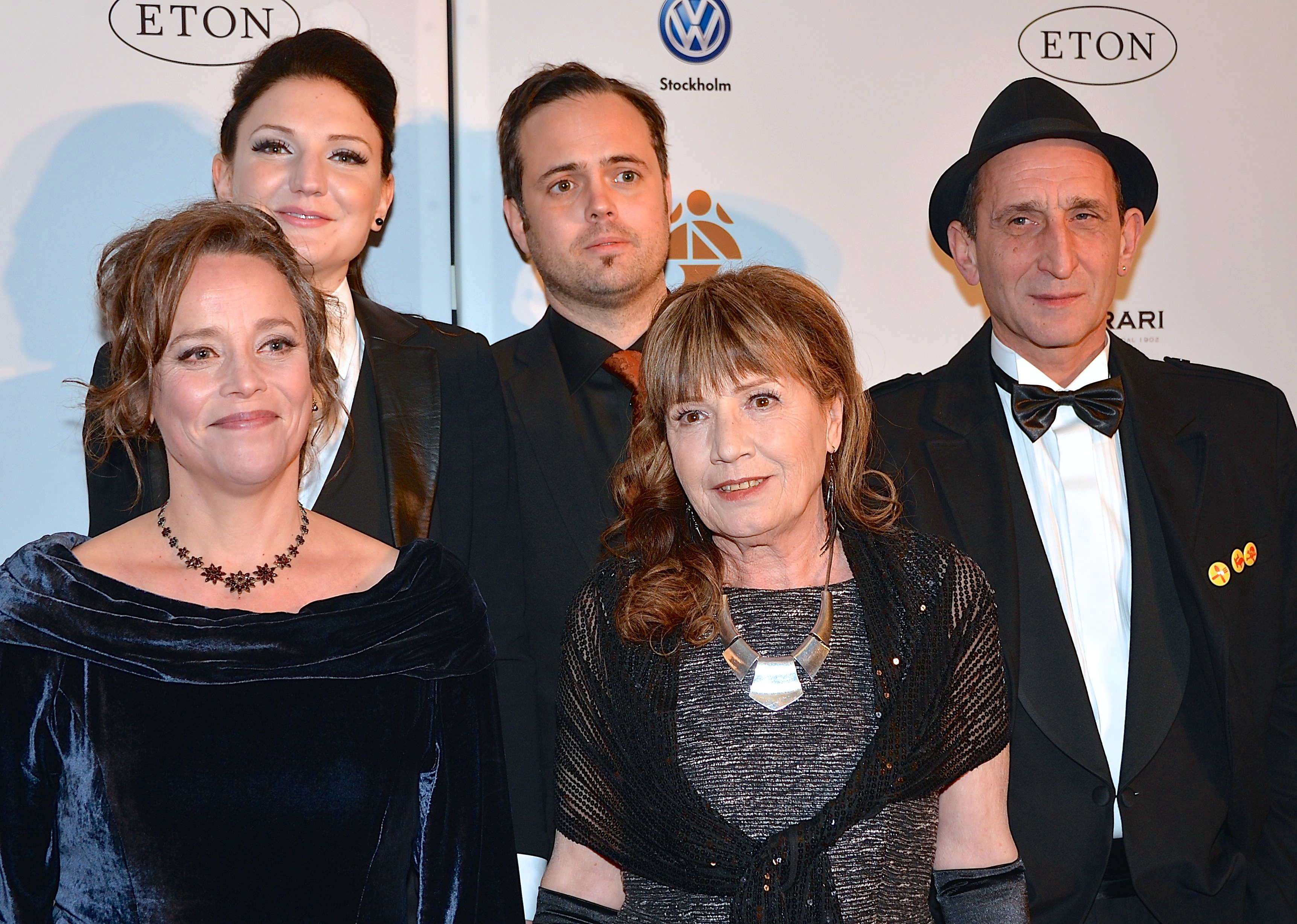 Äta sova dö-gänget på Guldbaggegalan den 21 januari 2013.